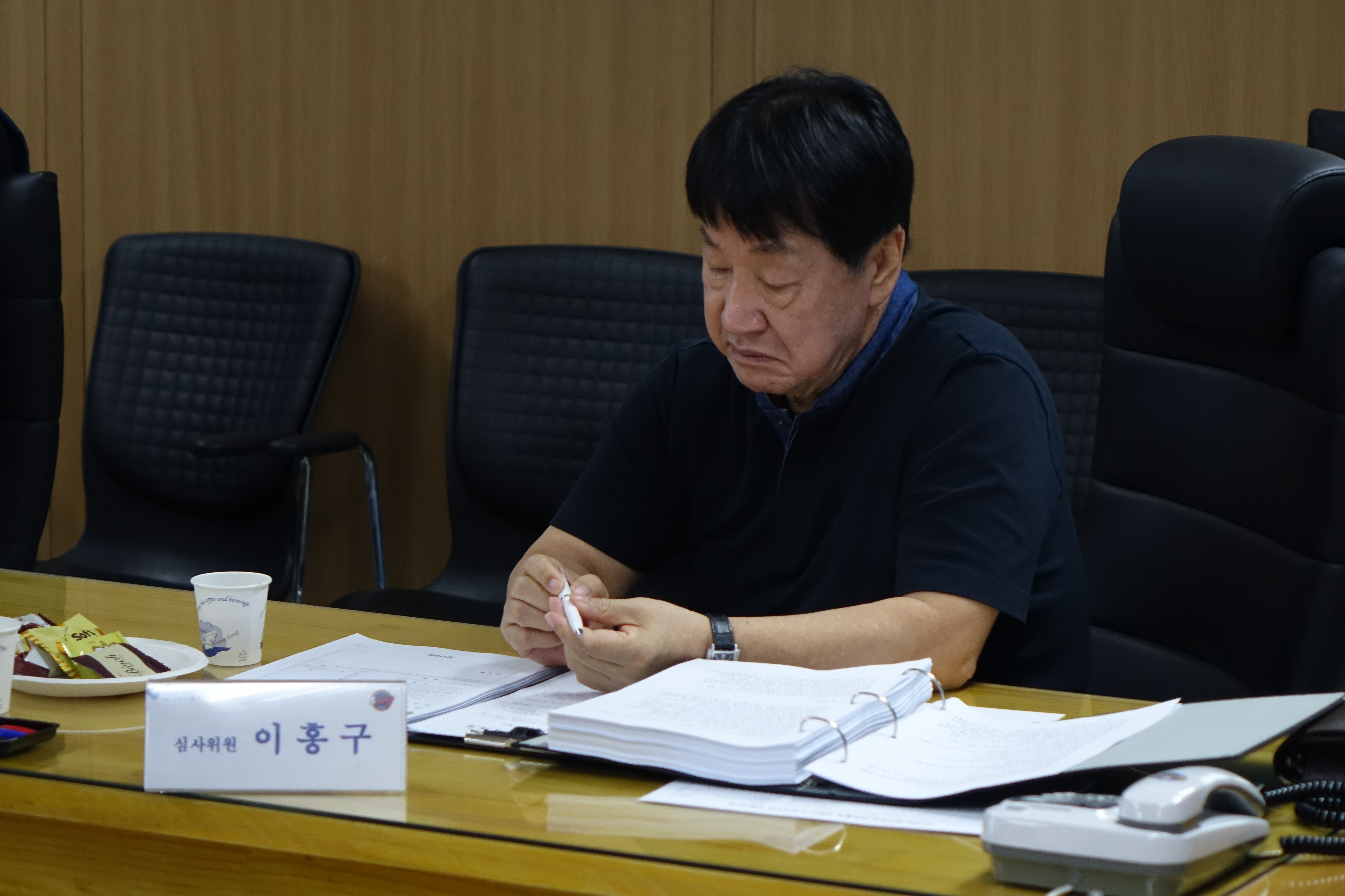 이홍구, 2015년 8월 서울특별시 중구 서울소방재난본부 재난현장 대응활동 경험수기 심사운영회의